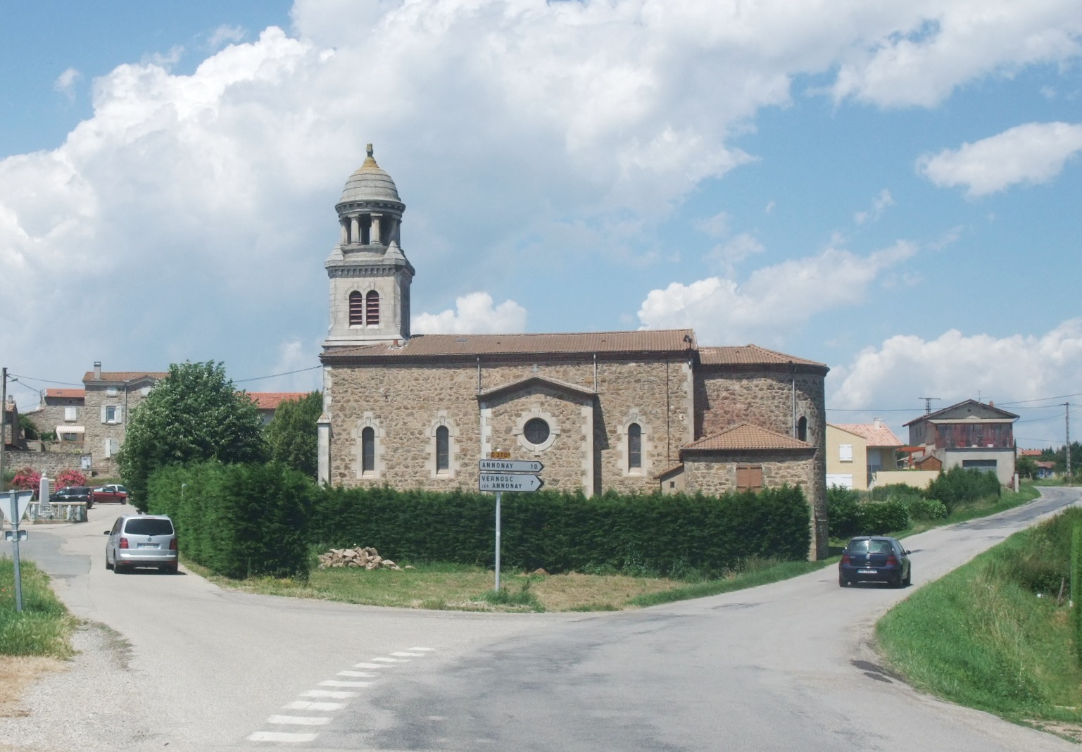 Talencieux église